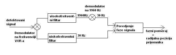 Prijem i obrada VOR signala.